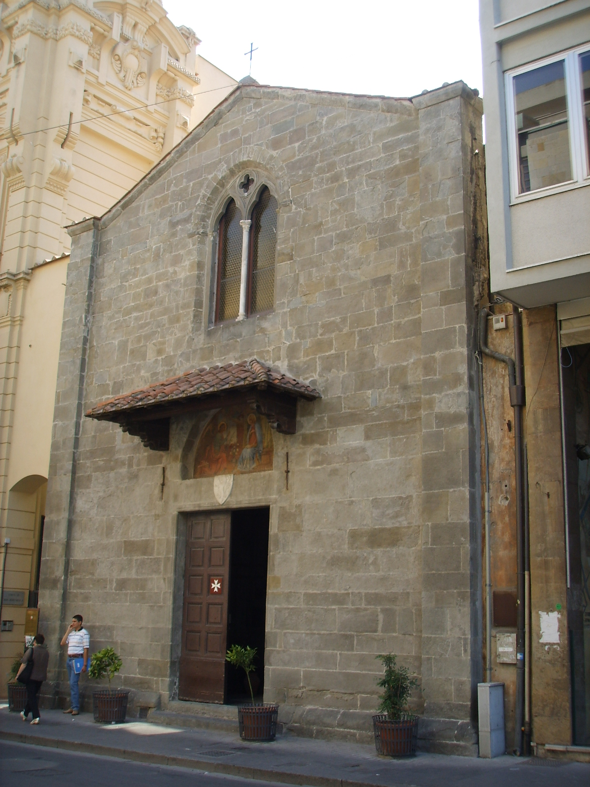 Chiesa di san domenico (pisa), esterno